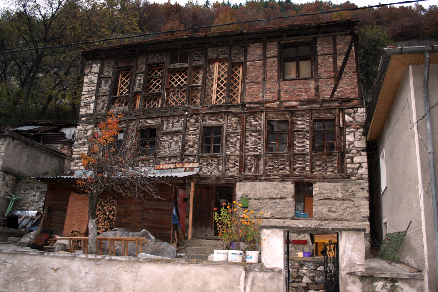 Къща в село Михалково